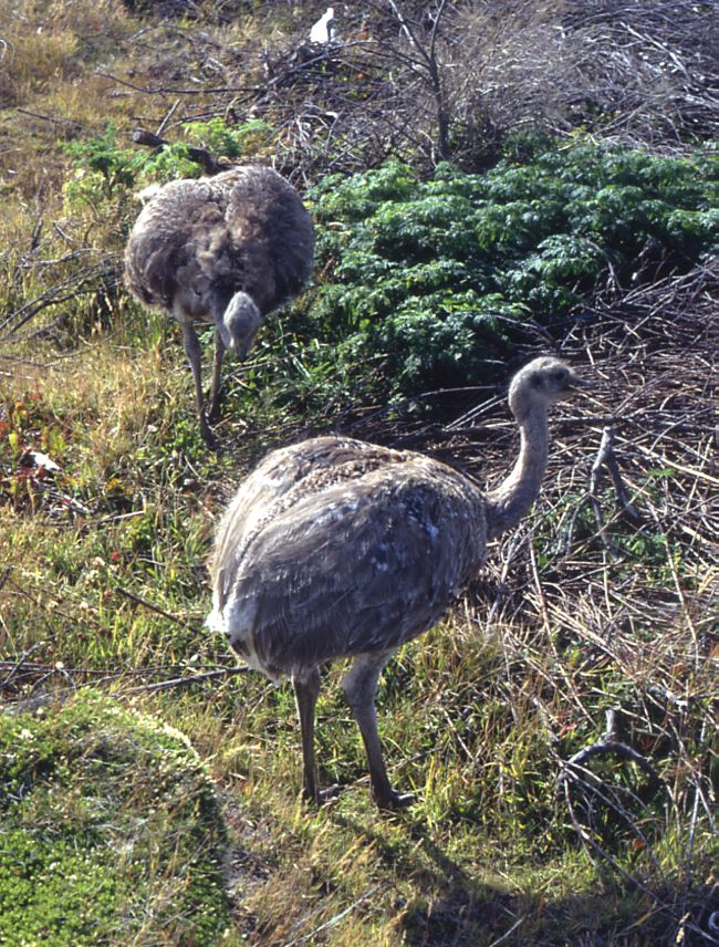 Darwin-Nandus (Pterocnemia pennata), Nandus (Rheidae) - Chile, Patagonien/Patagonia, Parque Nacional Torres del Paine, bei Posada Río Serrano